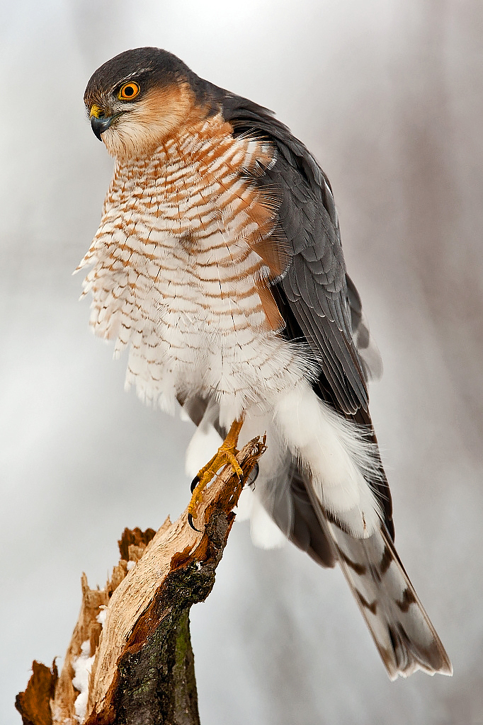 Accipiter nisus (male), Gajary, Slovakia